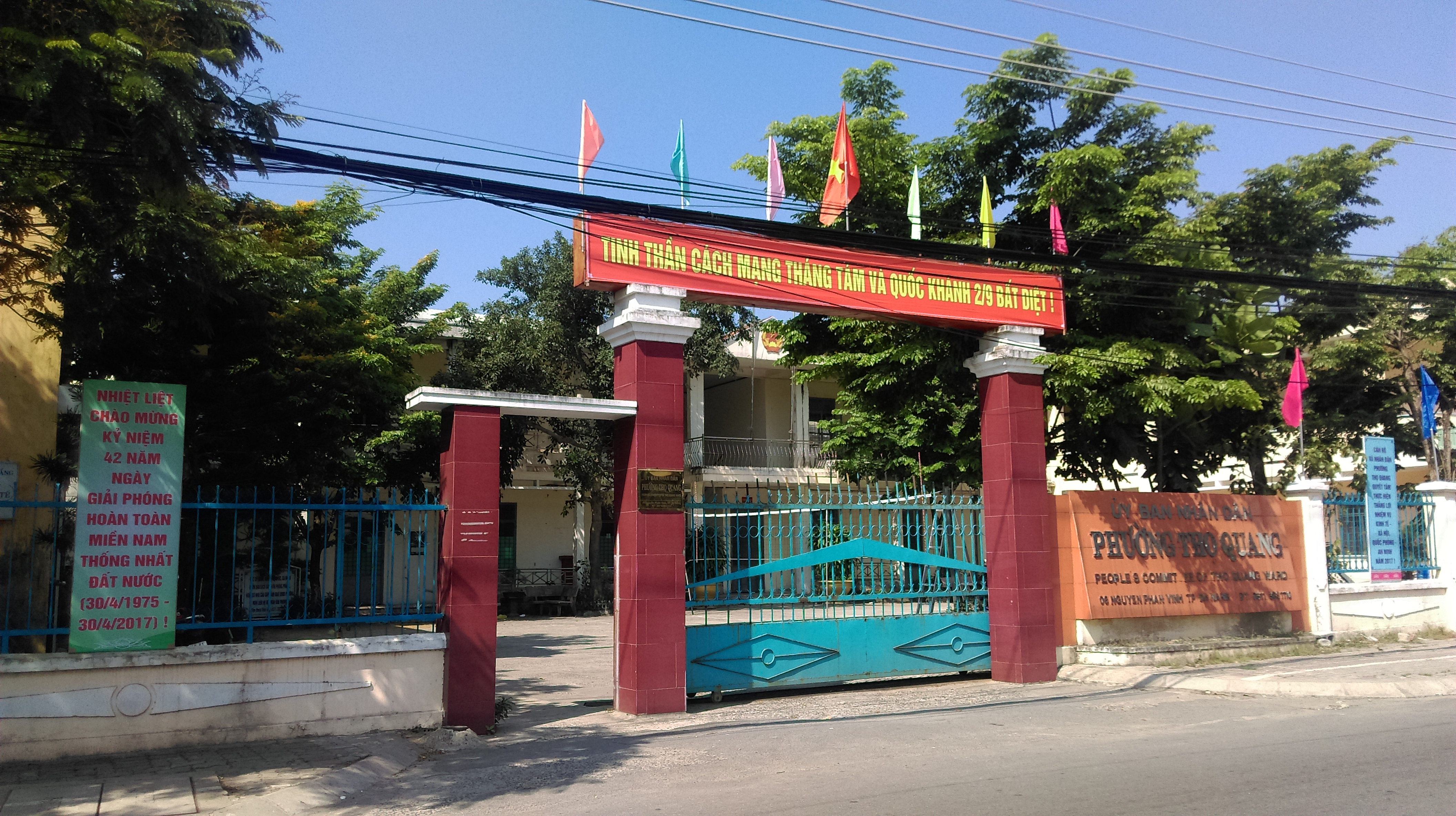 UBND phường Thọ Quang, Sơn Trà, Đà Nẵng